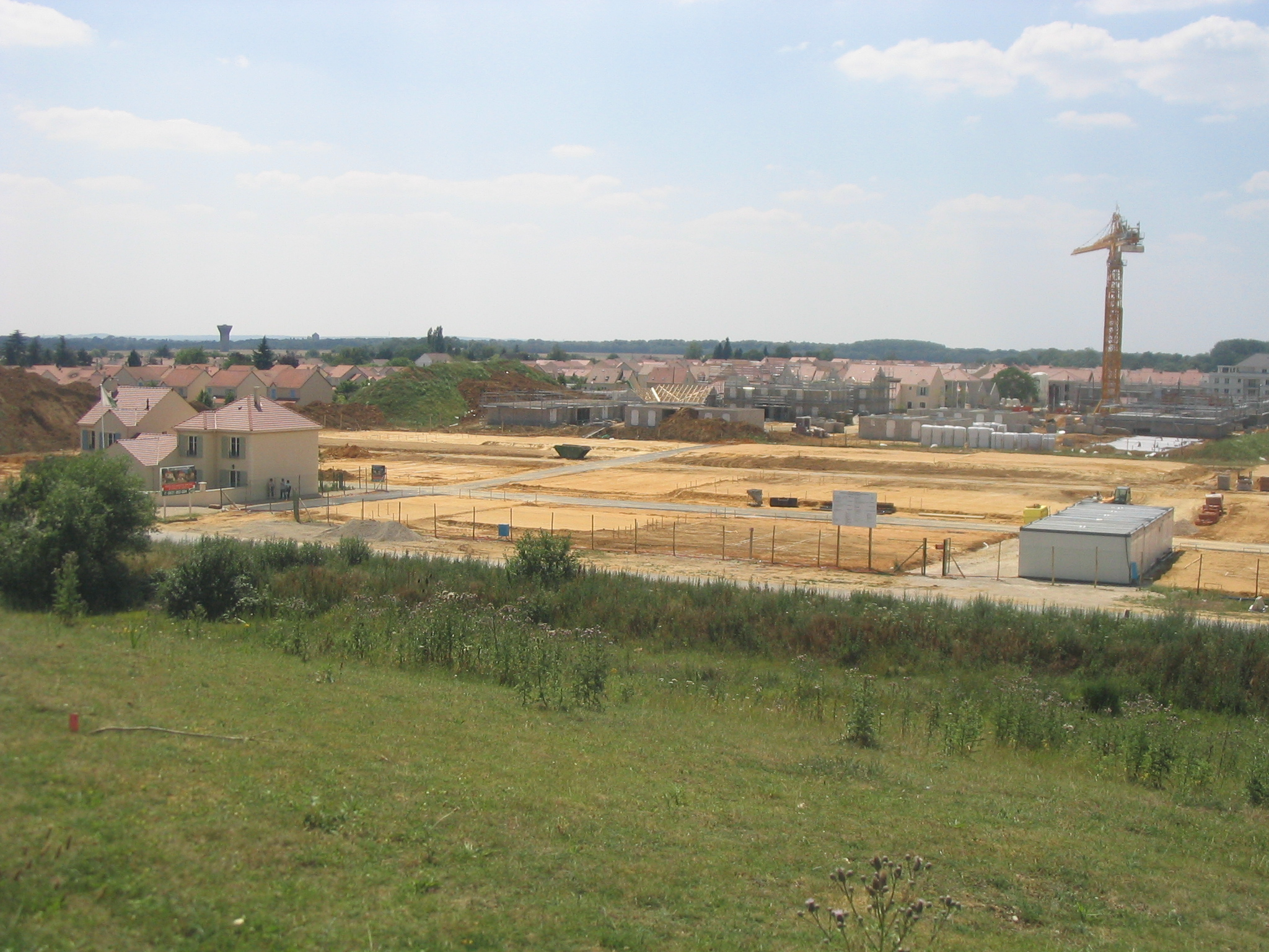 Le chantier du quartier des Cités-Unies à Savigny-le-Temple. Etat au 1er juillet 2006. Construction of Cités-Unies quarter, in Savigny-le-Temple. State: July, 1, 2006. Auteur/Autor/Author:Tej